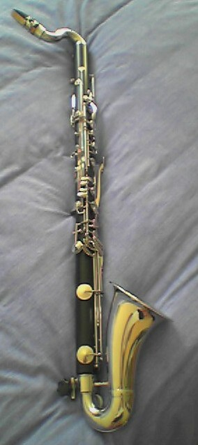 Clarinette alto